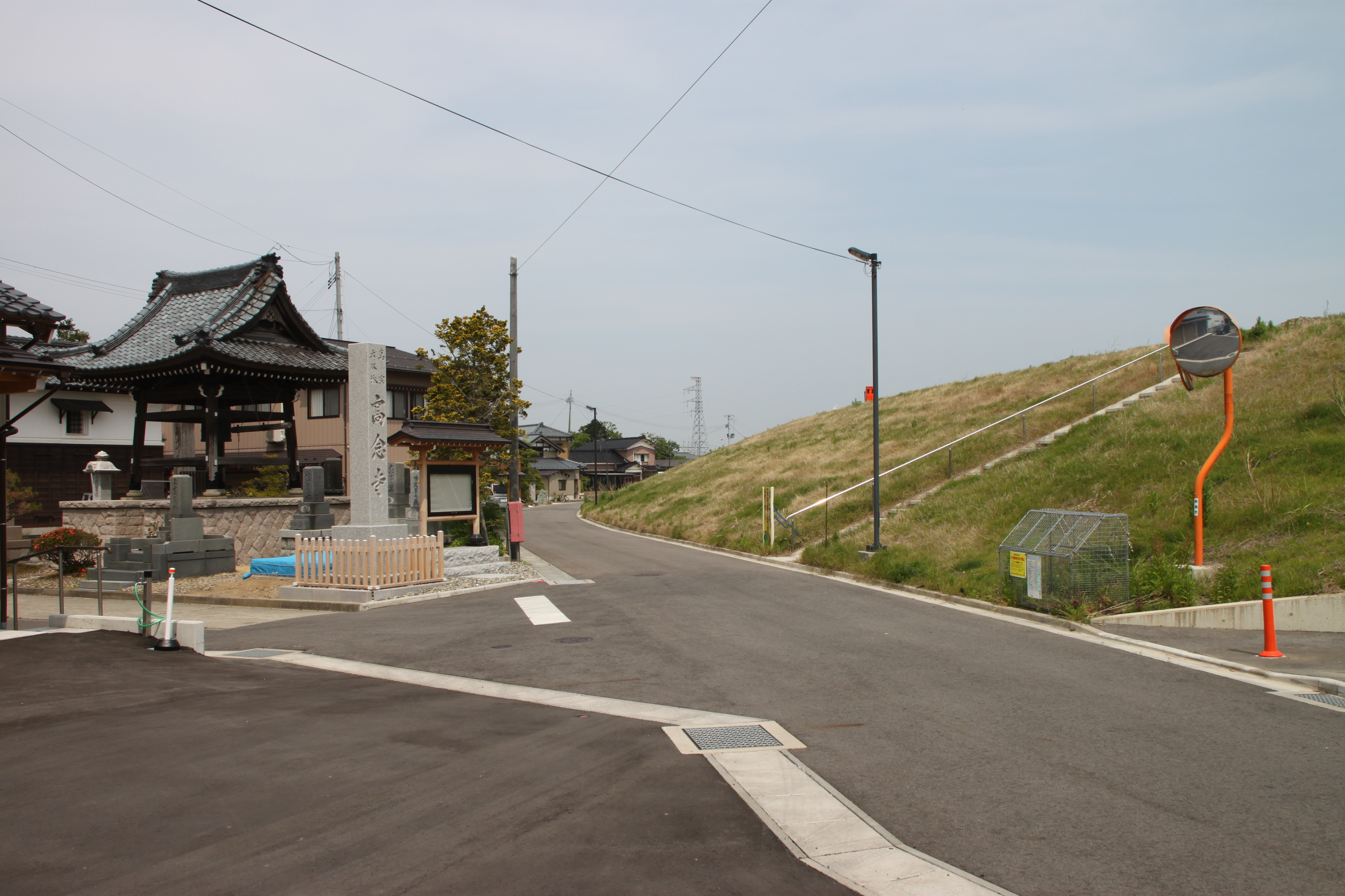 新潟交通吉江駅跡。堤防上の道路の拡幅で、その法面に埋まってしまった。駅の痕跡は全くない。